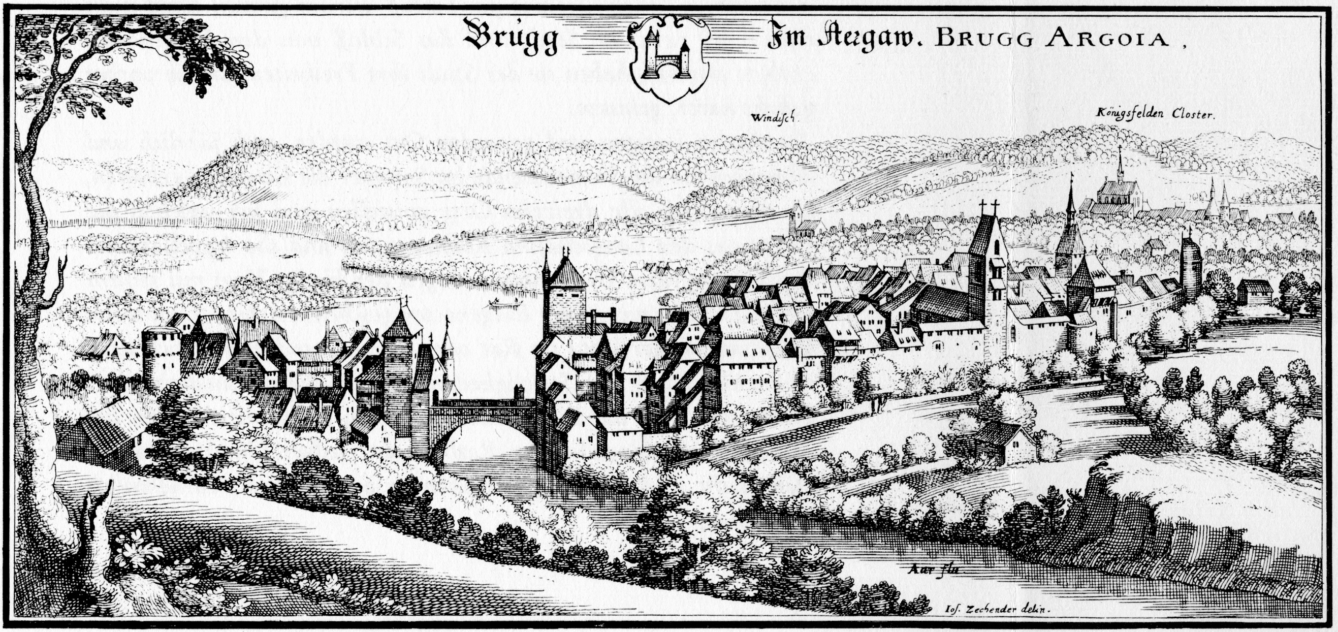 Ansicht der Stadt Brugg im heutigen Kanton Aargau, Schweiz, 1642